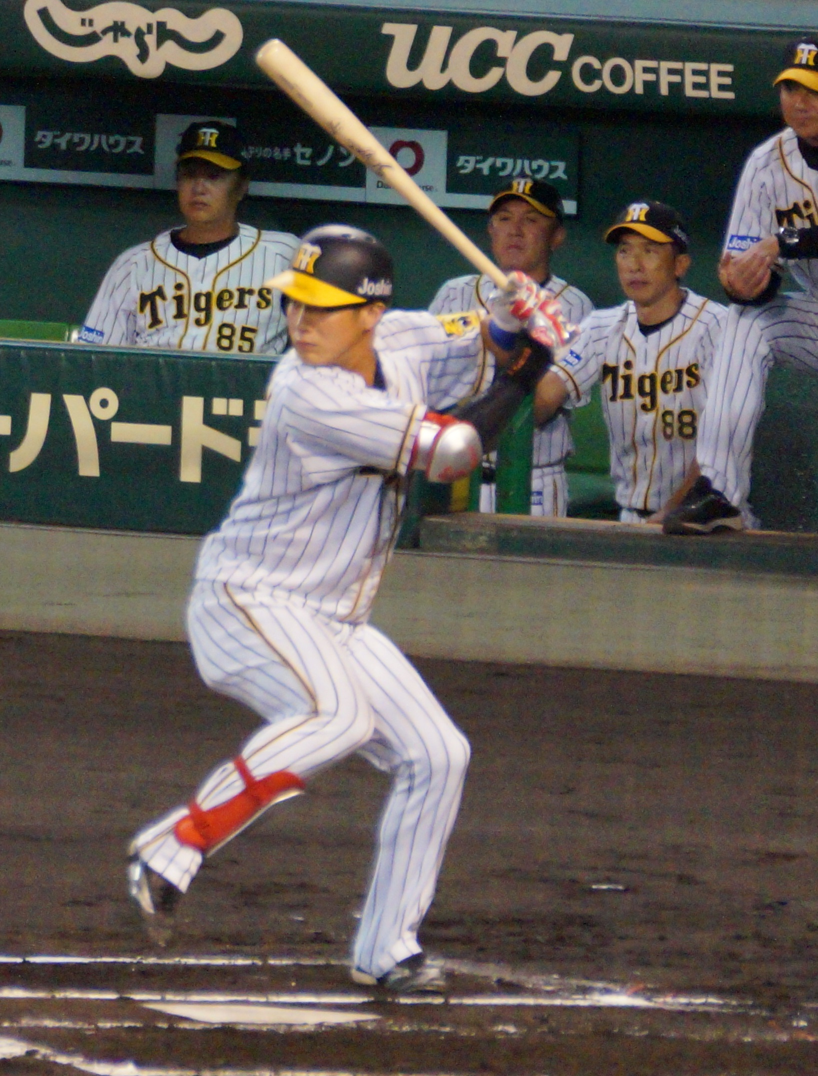 2019年9月19日 阪神甲子園球場にて